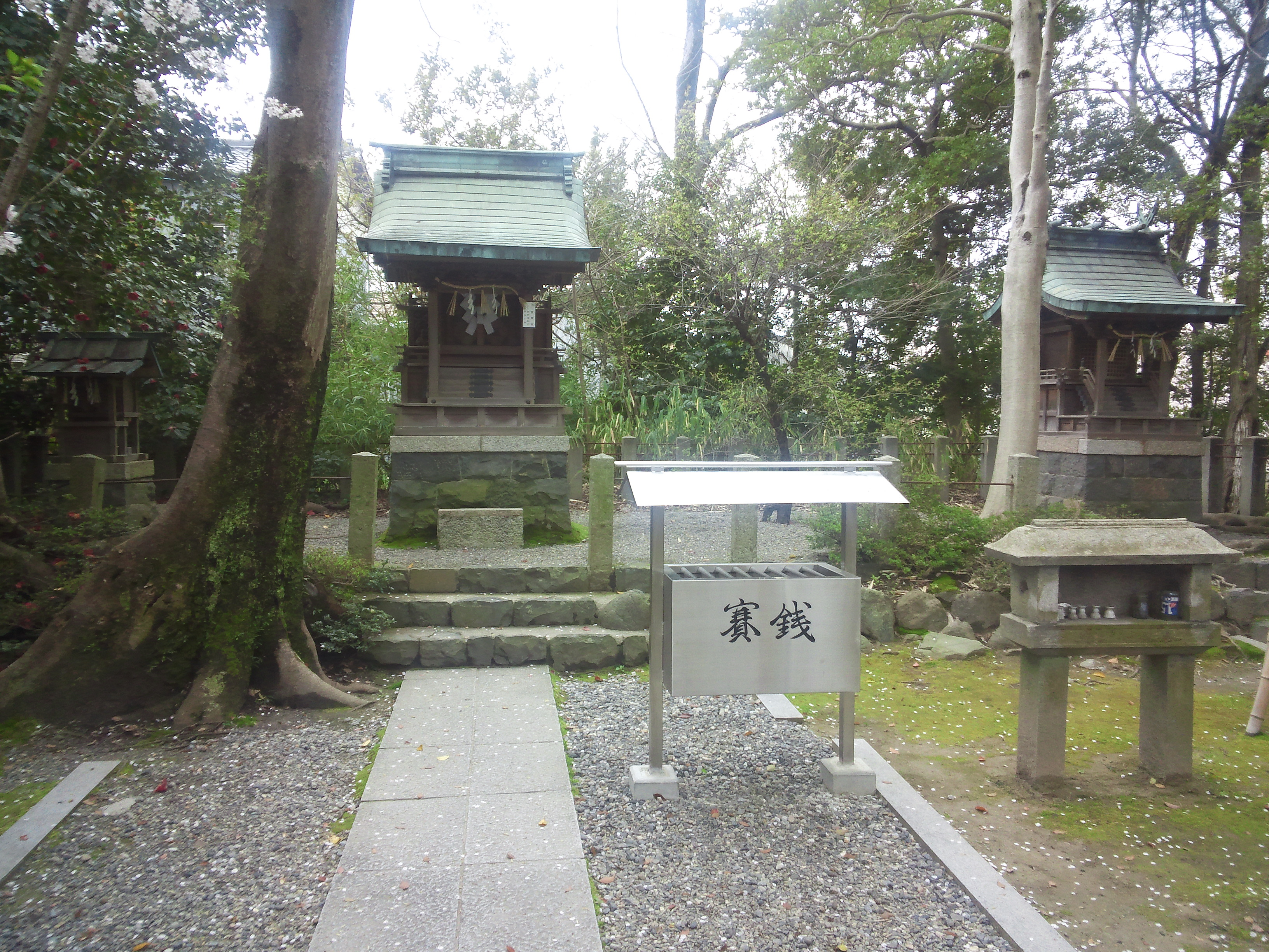 津島神社 - 菅原社